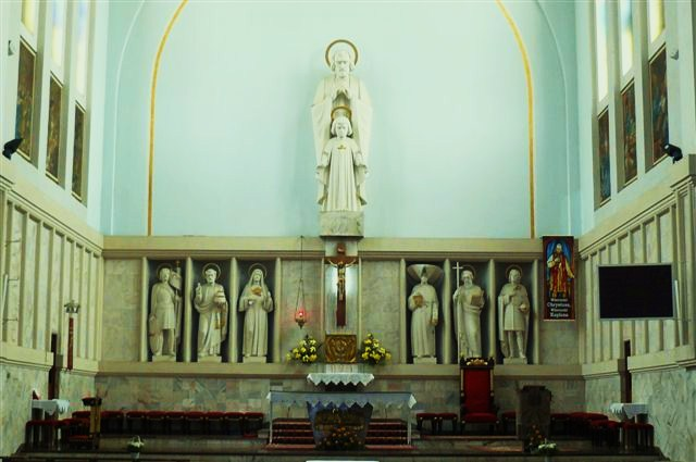 Tczew, kościół św. Józefa, wnętrze.